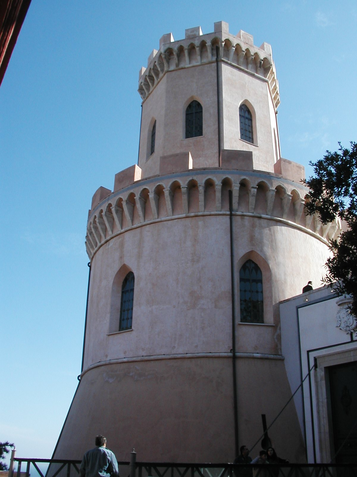 Corigliano Calabro - Torre del castello Foto di Luigino C.